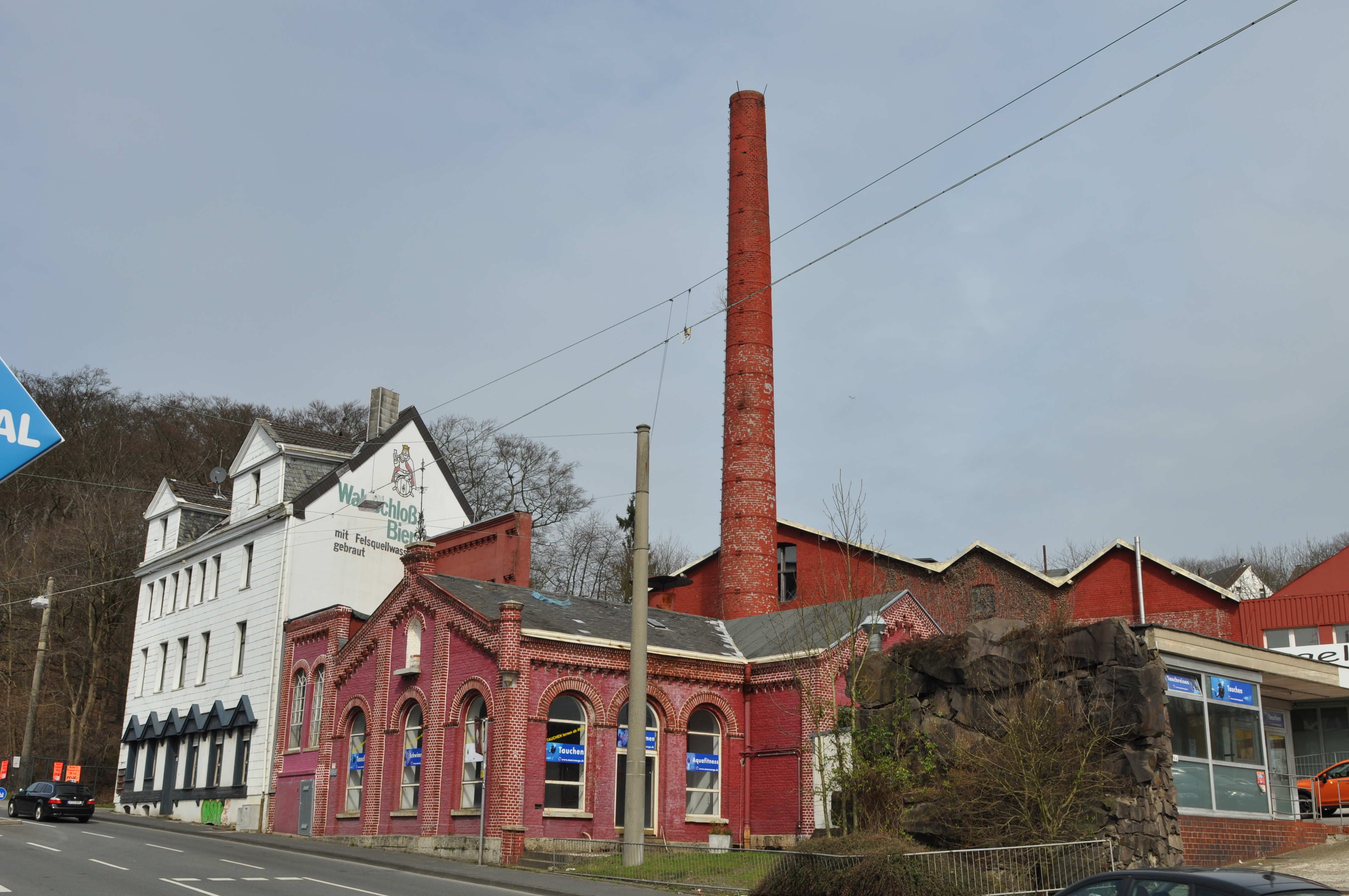 Wuppertal, Märkische Straße